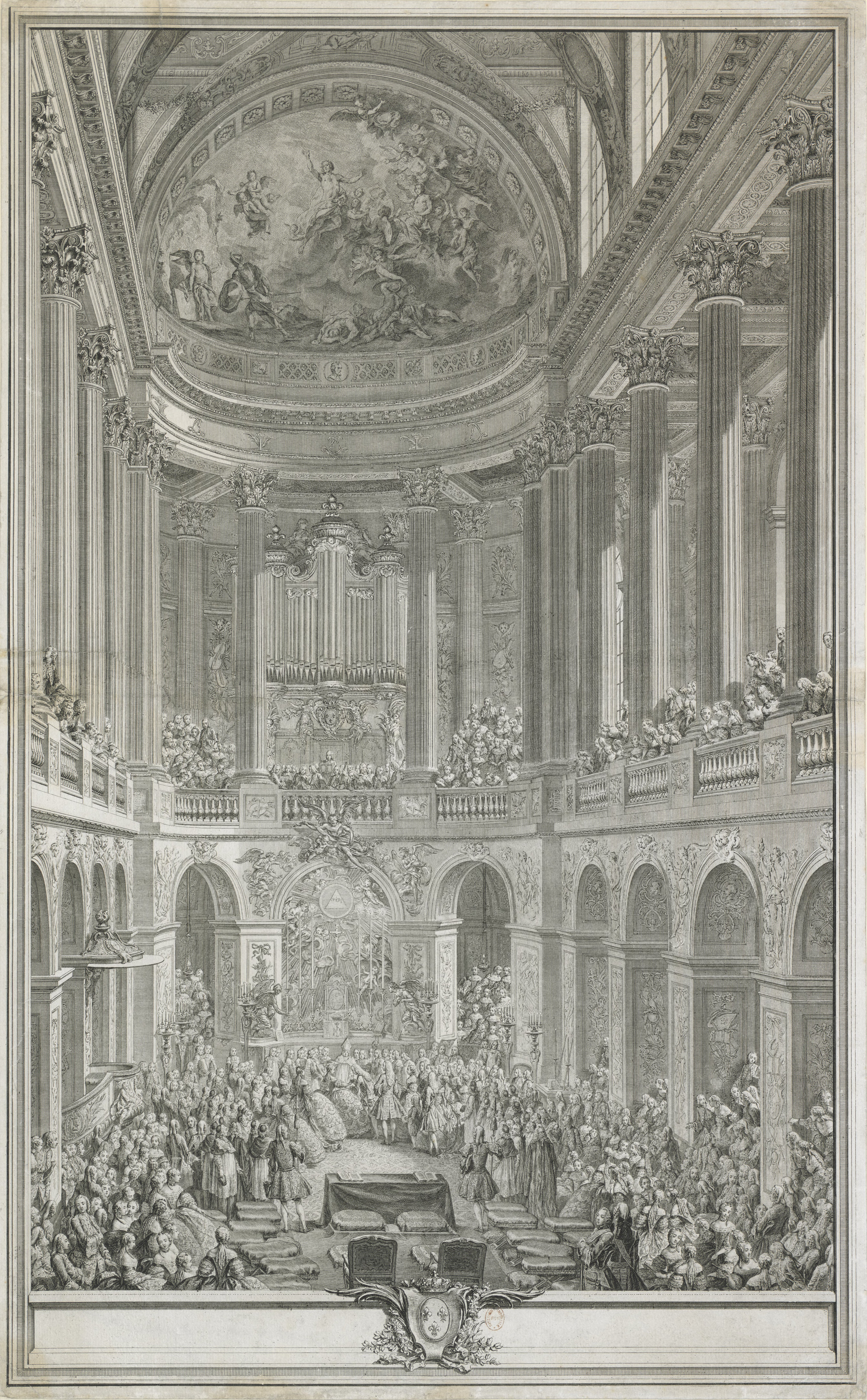 Cérémonie du Mariage de Louis Dauphin de France avec Marie-Thérèse infante d'Espagne dans la chapelle du Chateau de Versailles le XXIII fevrier M. DCCXLV